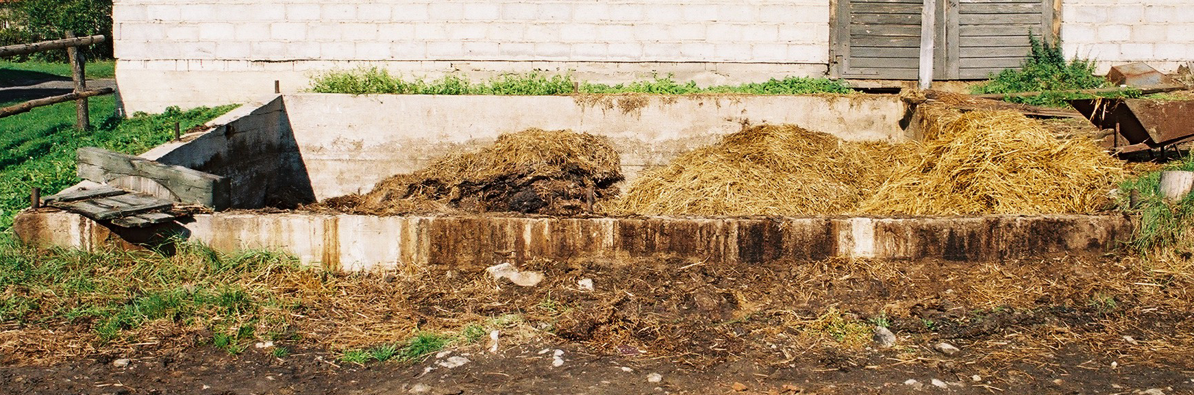 Gnojownia - obiekt na obszarze ziemi lublinieckiej.